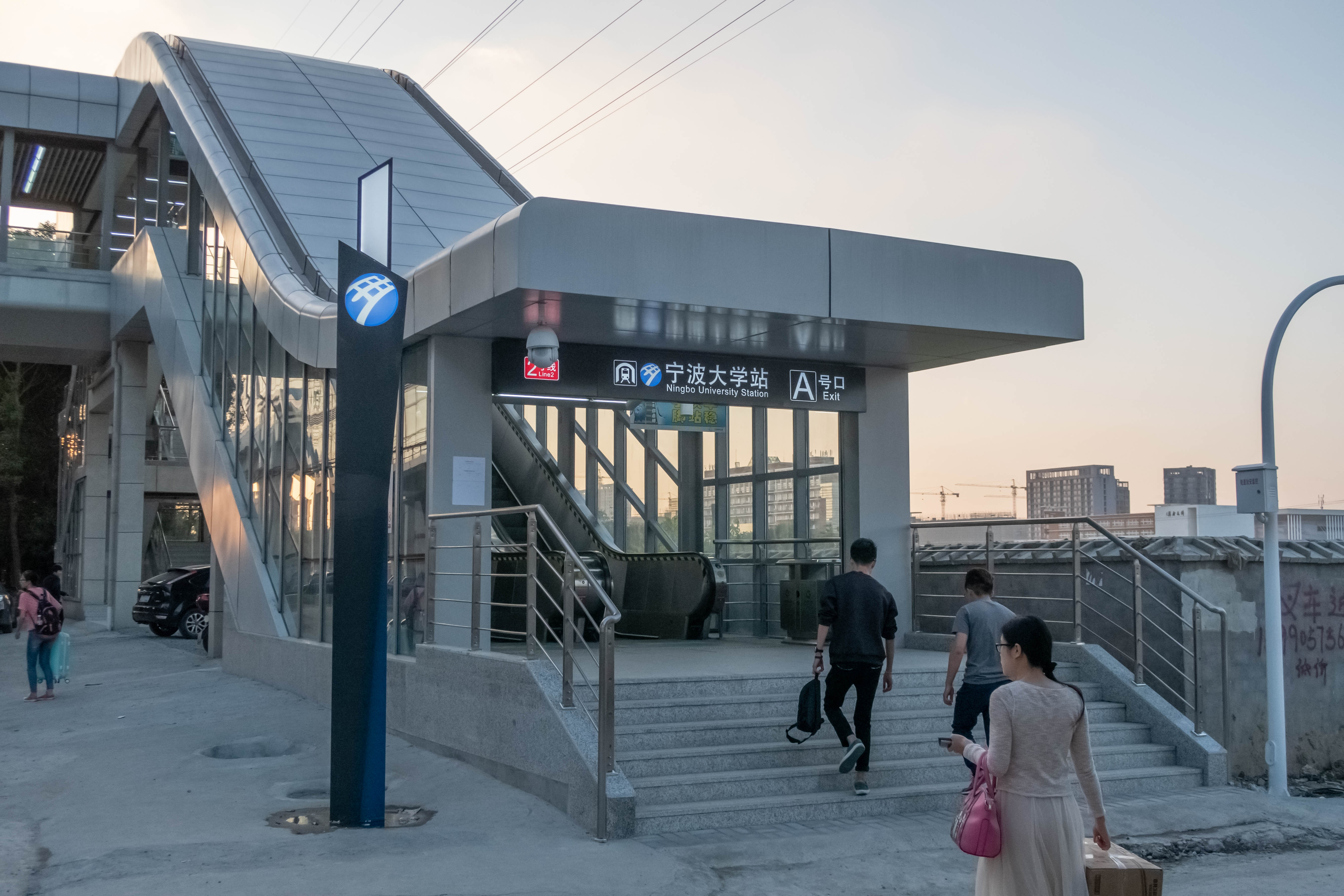 宁波地铁2号线——宁波大学站